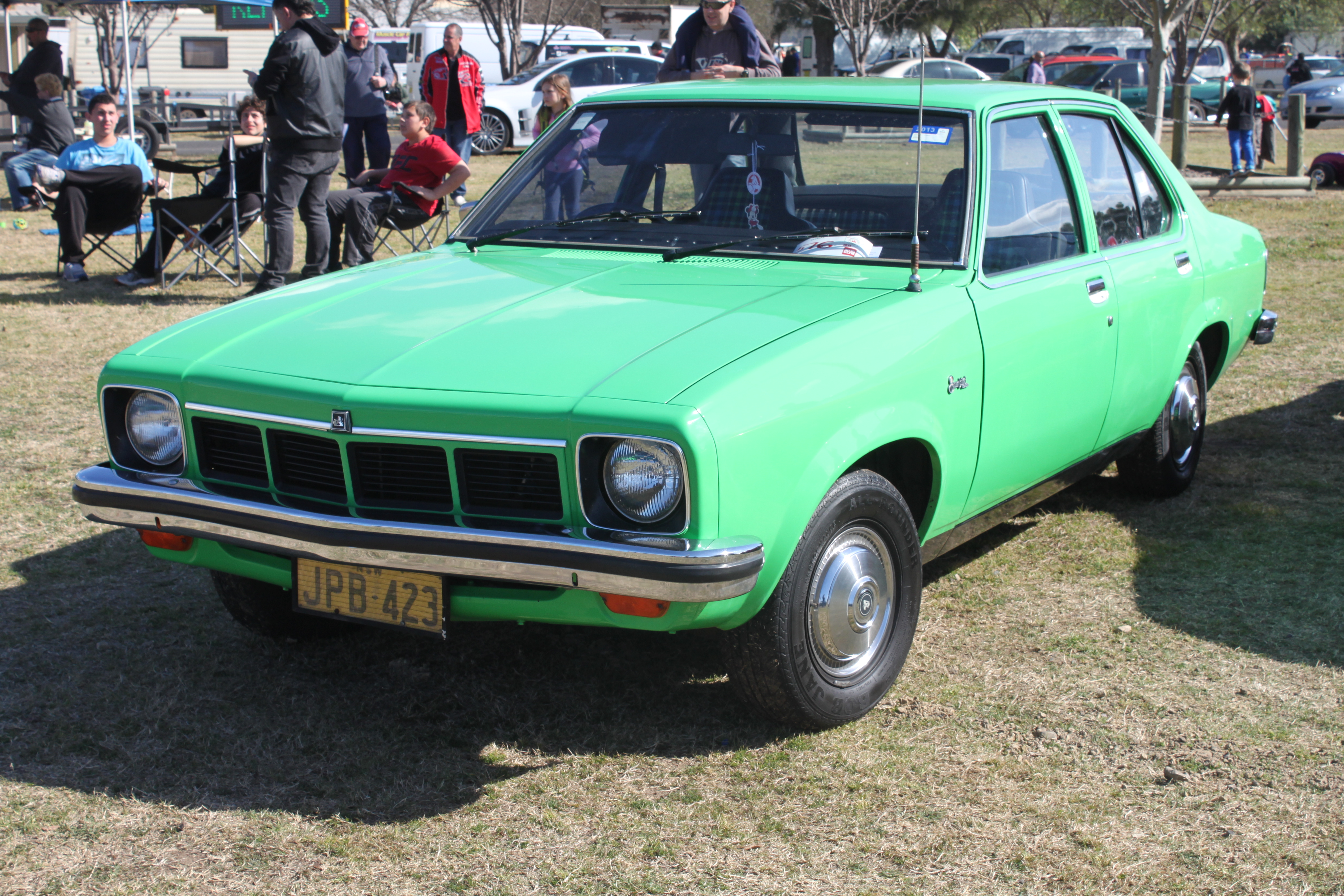 Holden Sunbird LX